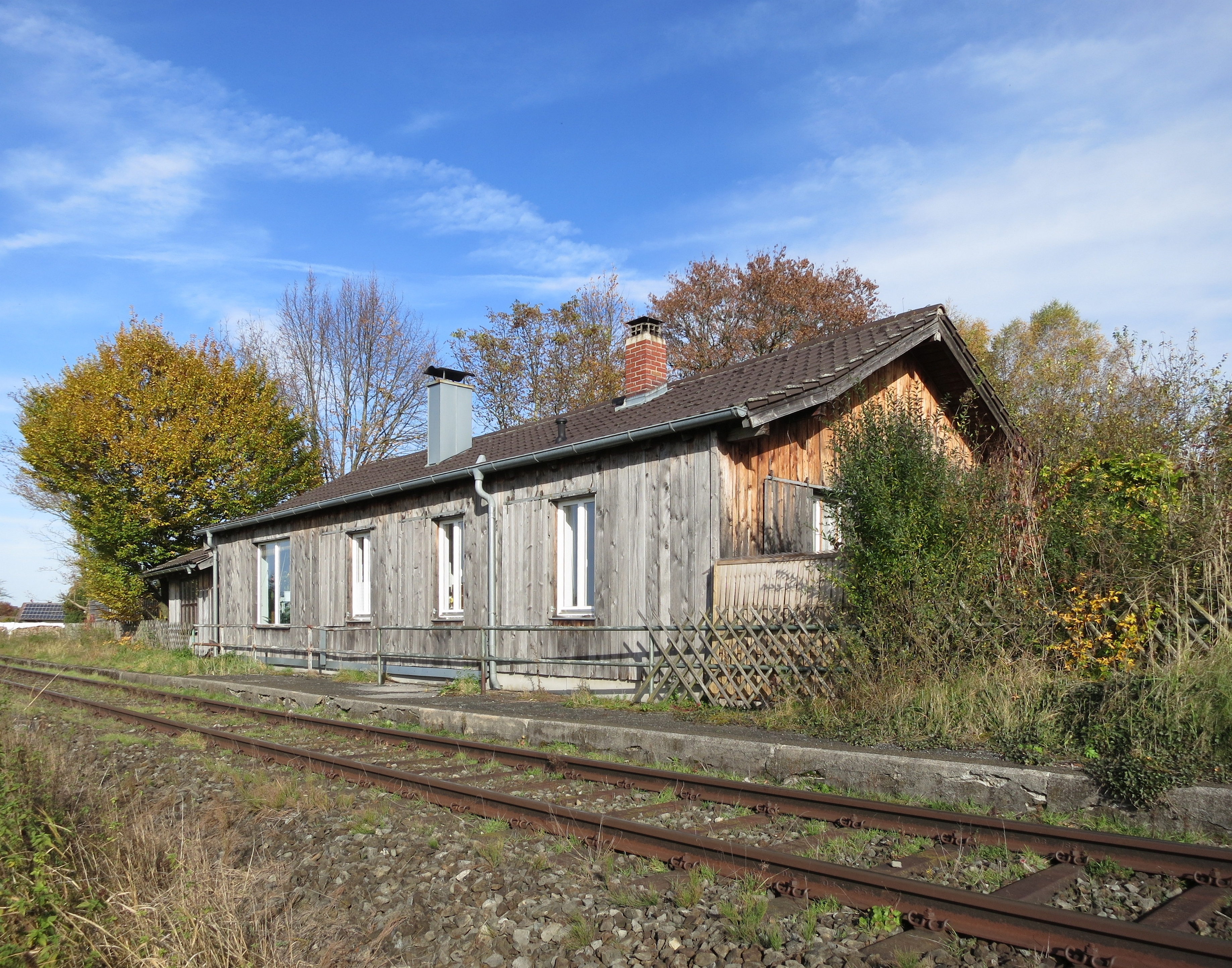 Zum Wohnhaus umgebautes Empfangsgebäude des stillgelegten Bahnhofs Wielenbach an der Ammerseebahn